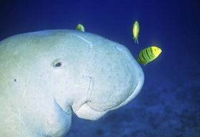 Dugong (Gabelschwanzseekuh), Talfa Tani (Marsa Alam), Ägypten